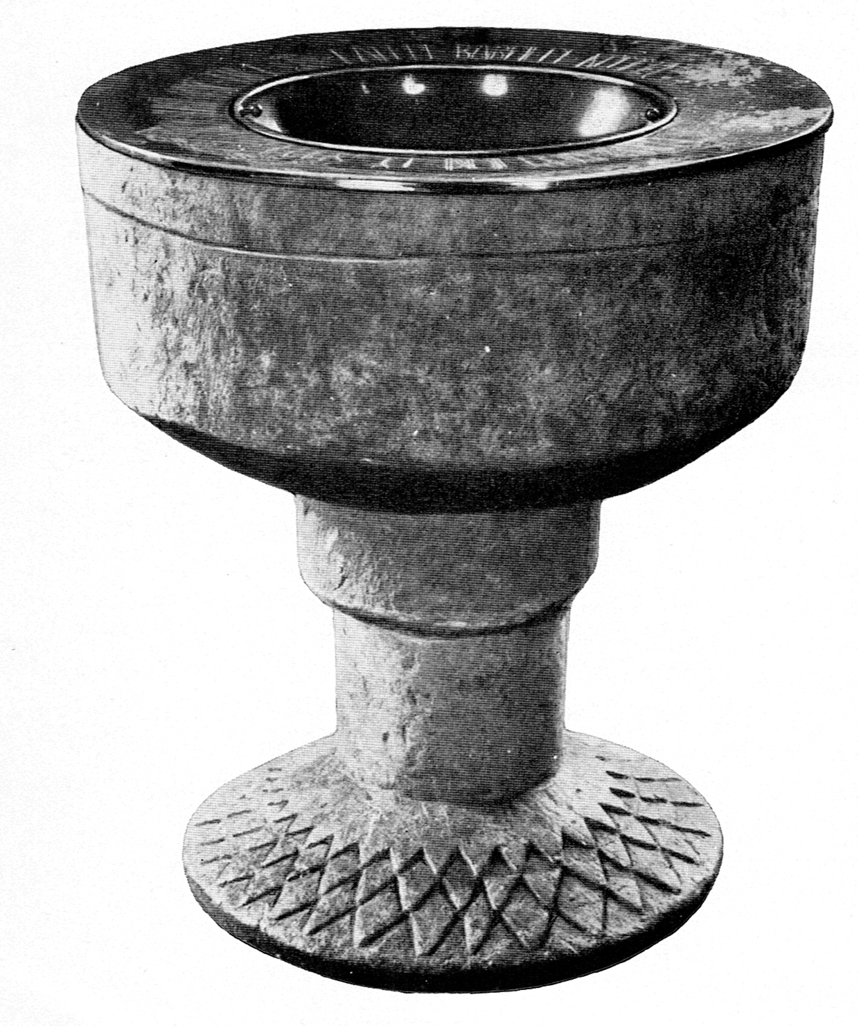 Örs kyrka, Dalsland. Dopfunt.